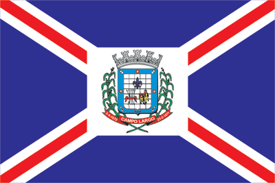 Bandeira de Campo Largo